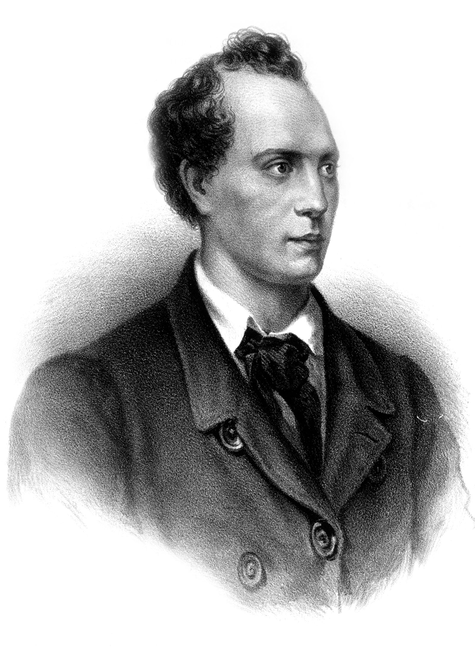 E. BARATYNSKY. Съ картины маслом N.N. Лит. А. Мюнстера, СПБ. Imp. Lith. A. Munster (Editeur)